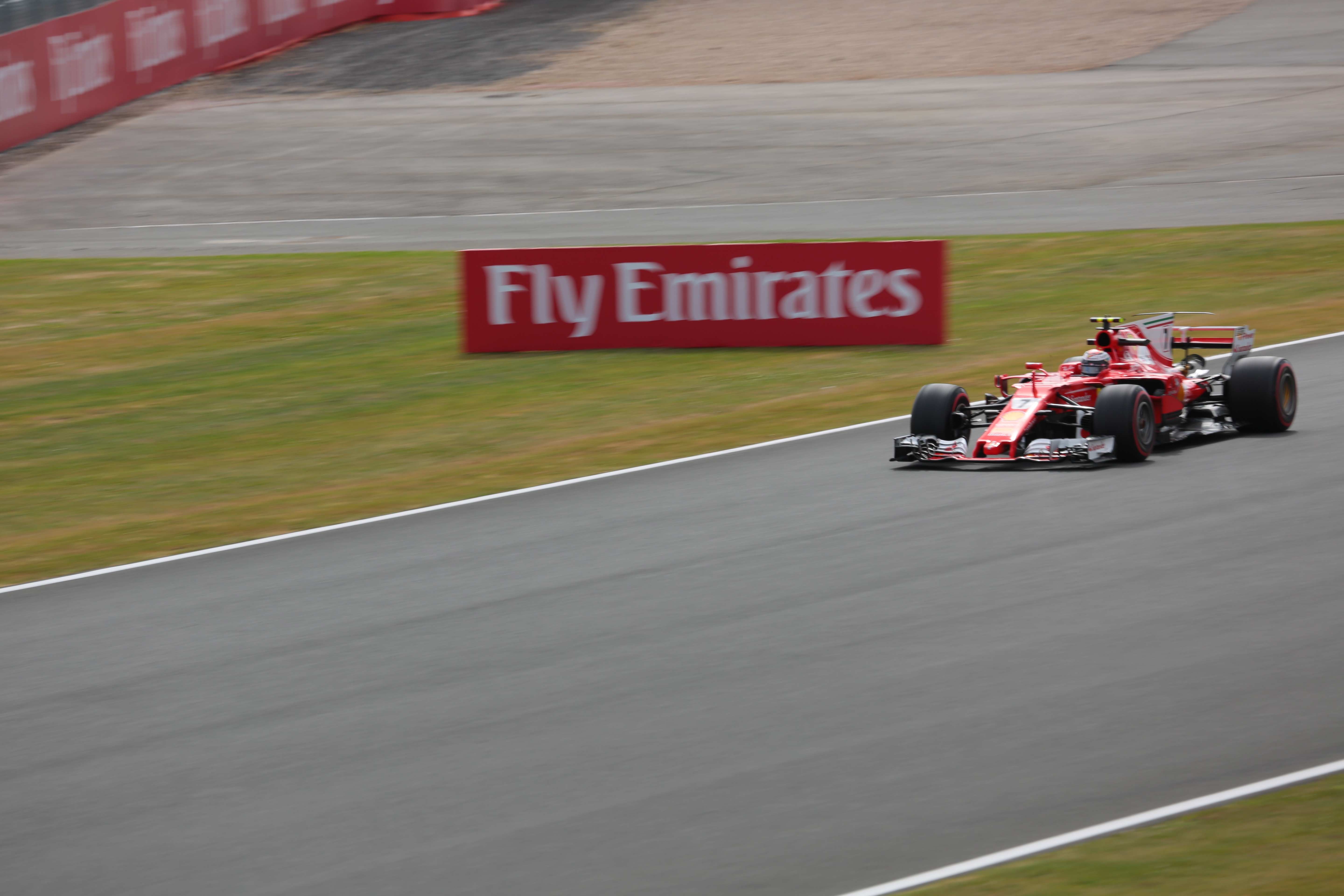 f1